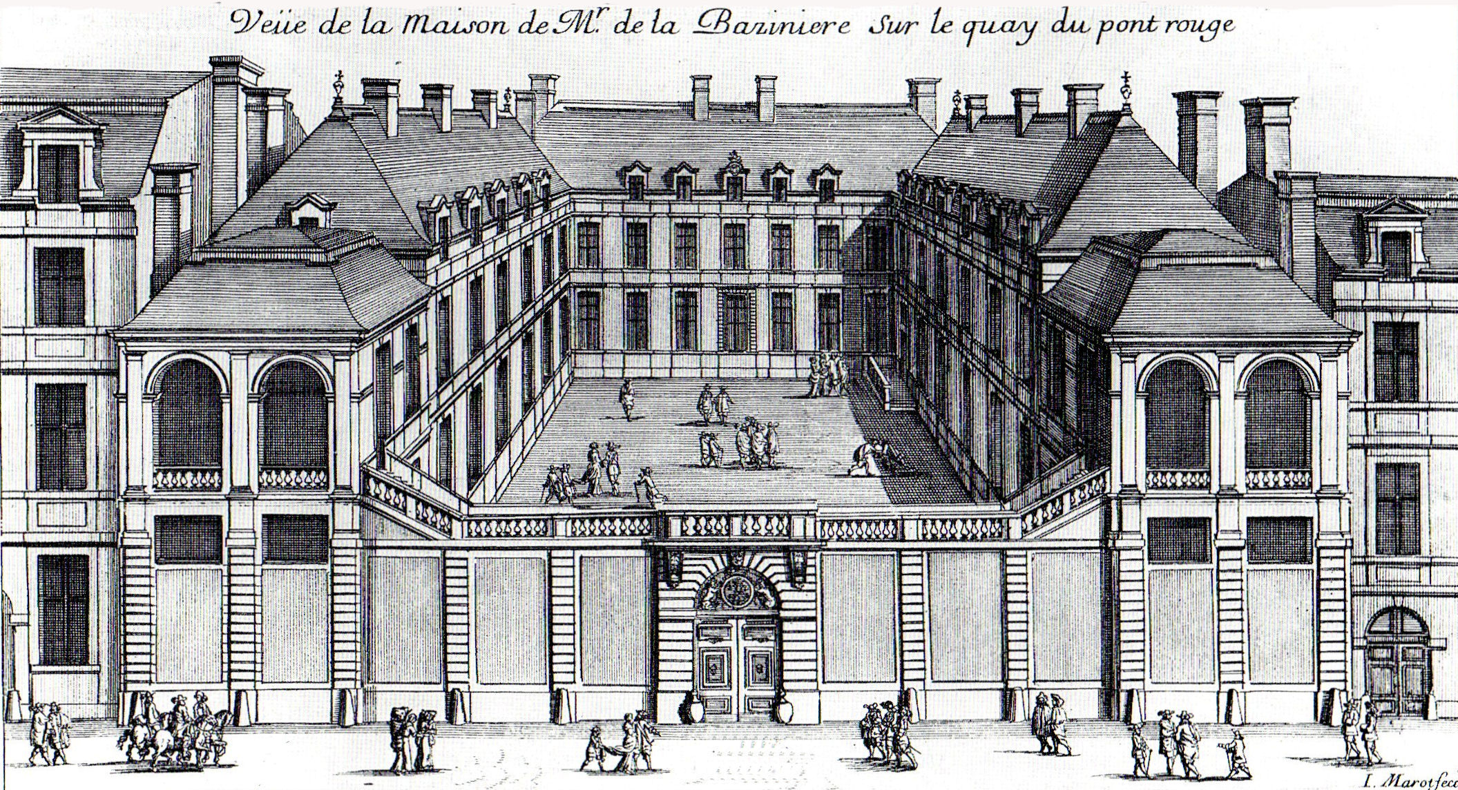 Jean Marot (français, 1619-1679): Vüe de la Maison de Mr de la Baziniere sur le quay du pont rouge, perspective gravée par Jean Marot vers 1658. L'Ancien Hôtel de La Bazinière, aussi appelé Hôtel de Bouillon ou Hôtel de Chimay, construit en 1642 par François Mansart, a été affecté à École des beaux-arts (aujourdhui ENSAB) en 1884. Son entrée est située sur l'actuel quai Malaquais, VIe arrondissement, Paris.